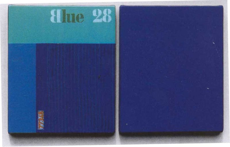 Konkrete Kunst: Thomas P. Kausel - Blue 28